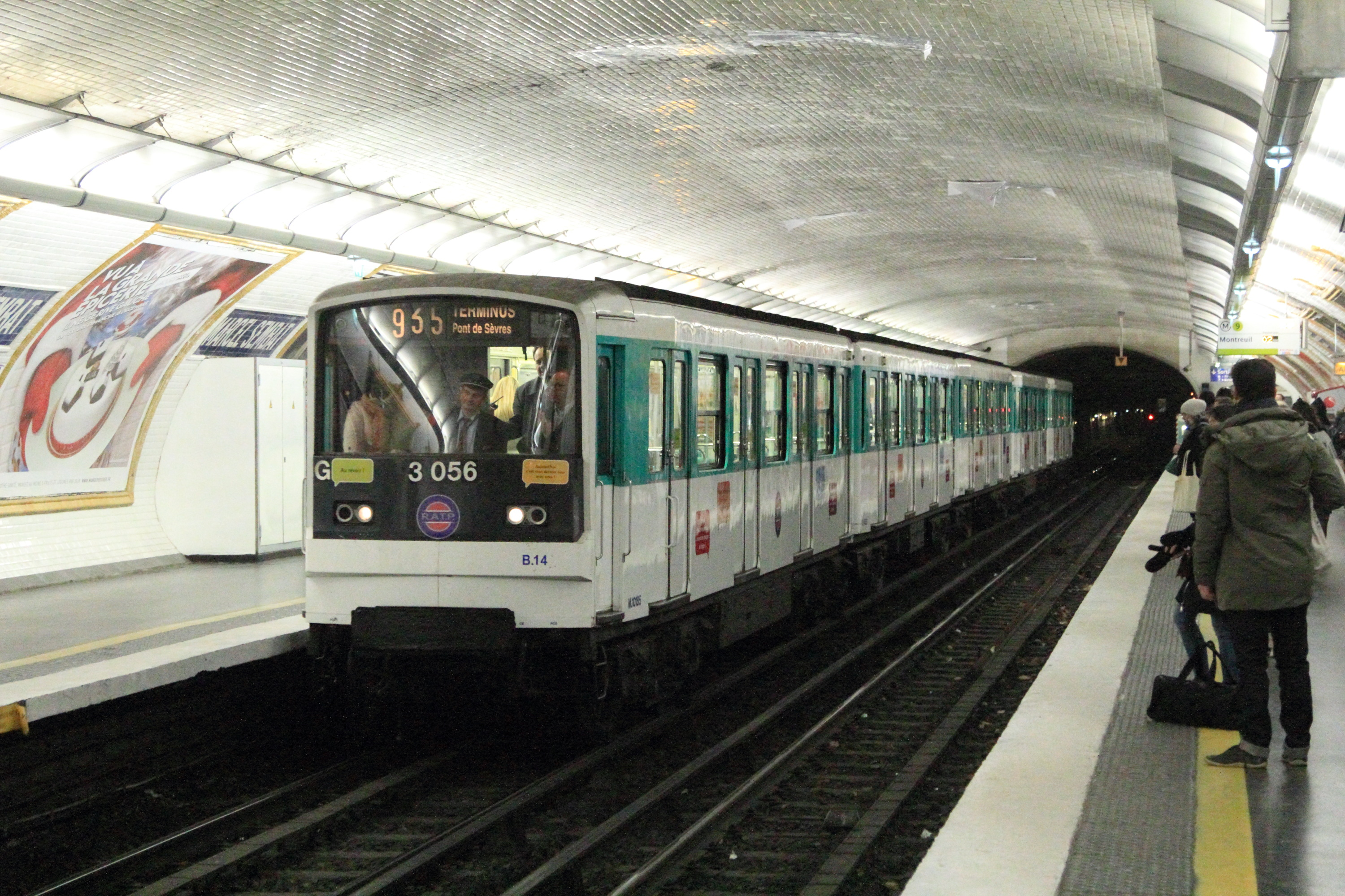 Dernières circulations de la dernière rame de métro de type MF 67 sur la ligne 9, à la station Marcel Sembat, lors d'une marche spéciale acheminant le personnel.